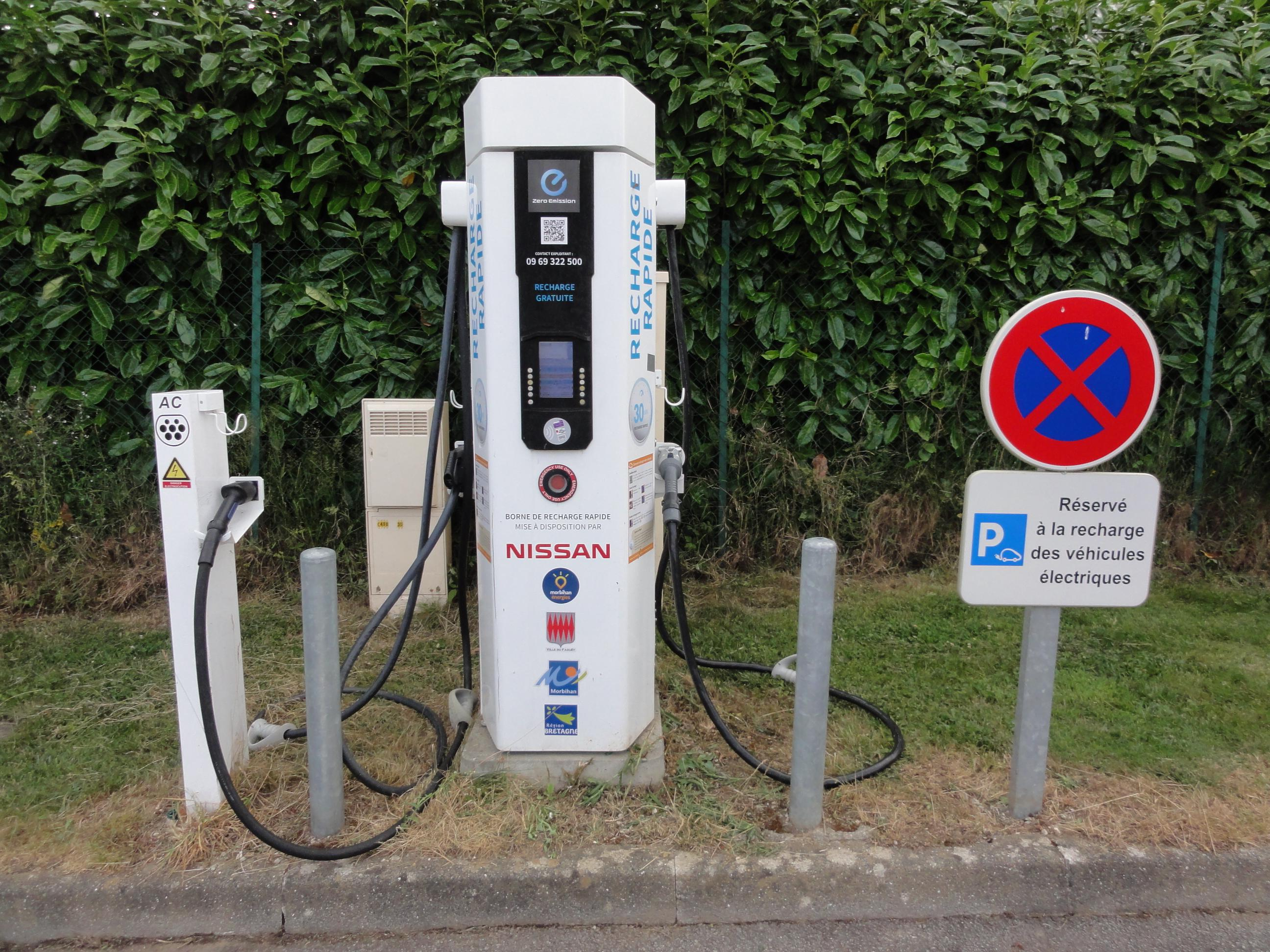 Borne electrique de recharge rapide de véhicules electriques (avec prises automobile de type T2 Combo et Chademo et CCS ) de Morbihan Energies dans la commune du Faouet (Morbihan)